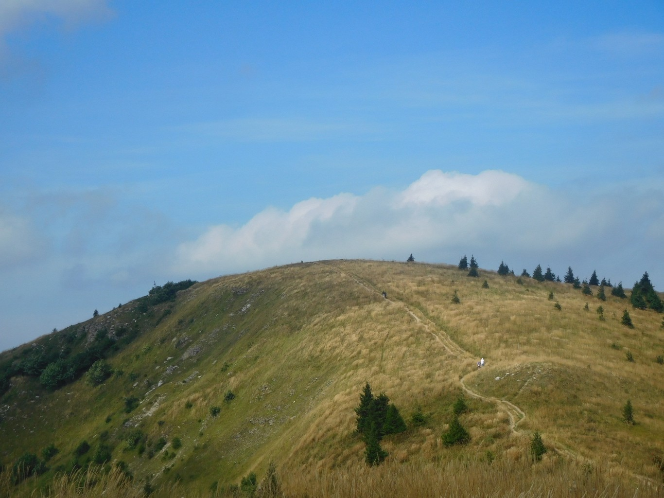 Zvolen (1403 m) od Novej hole